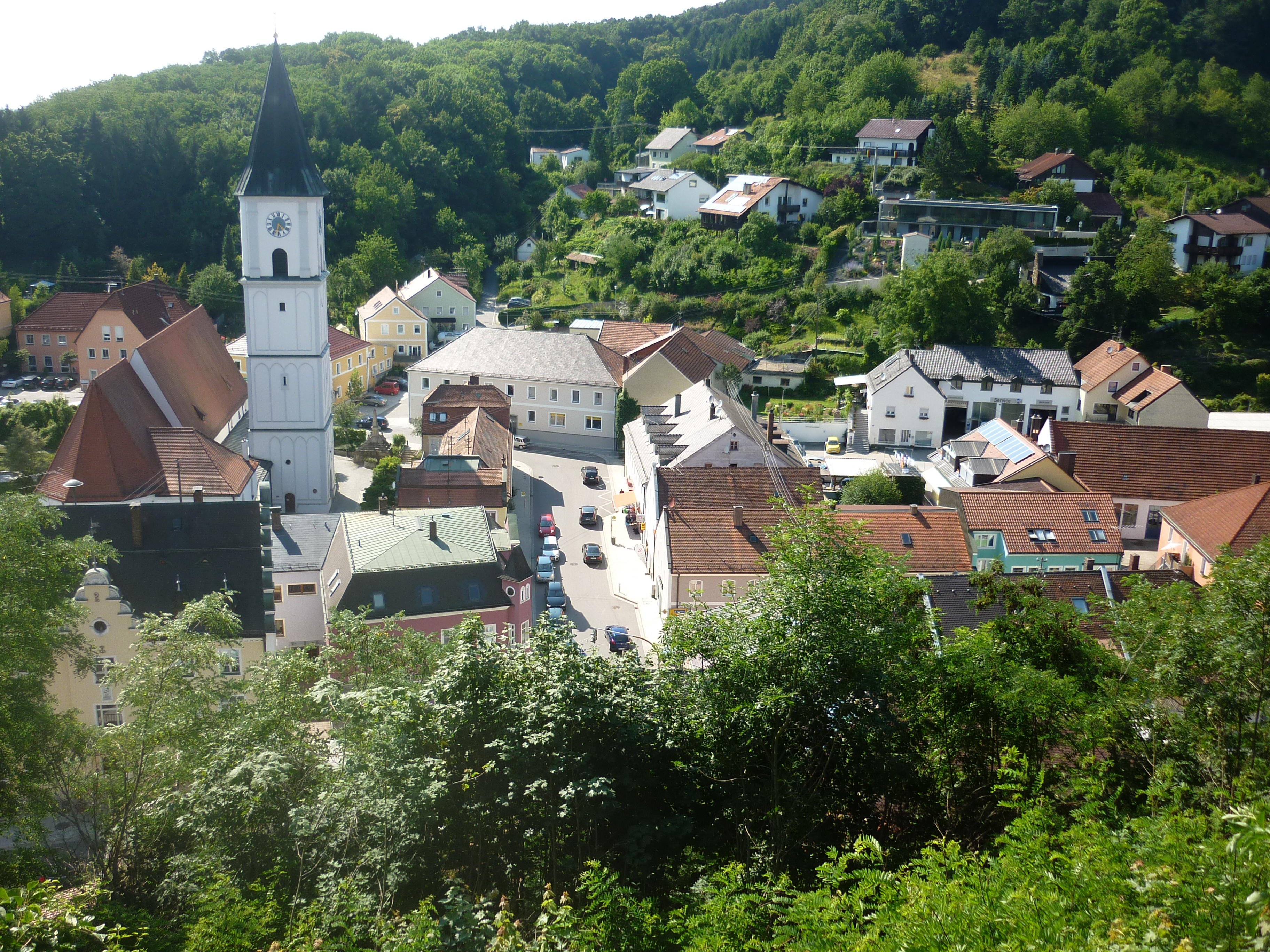 Wörth an der Donau Blick vom Schloss ins Zentrum